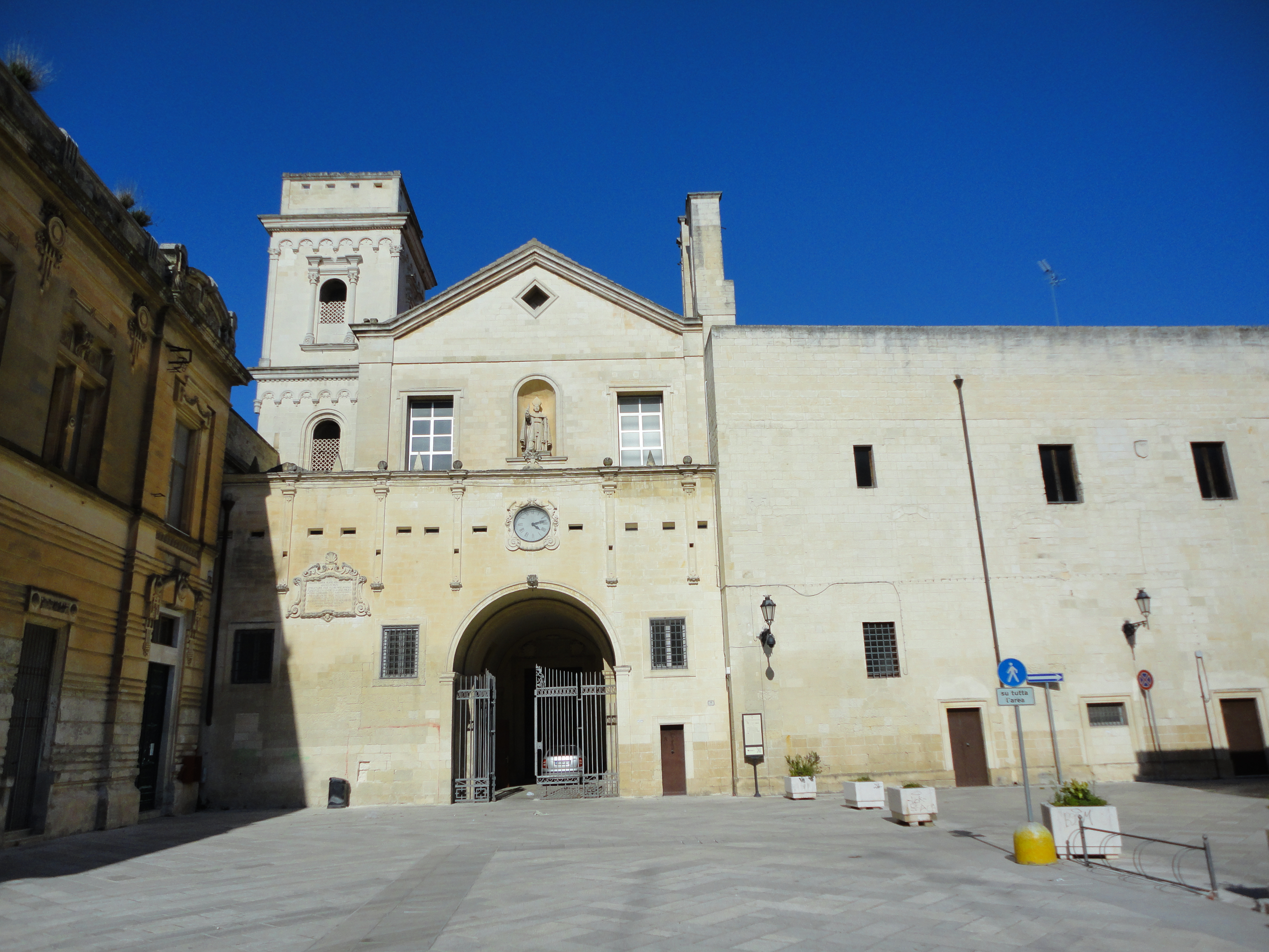 Lecce Chiesa di San Giovanni Evangelista